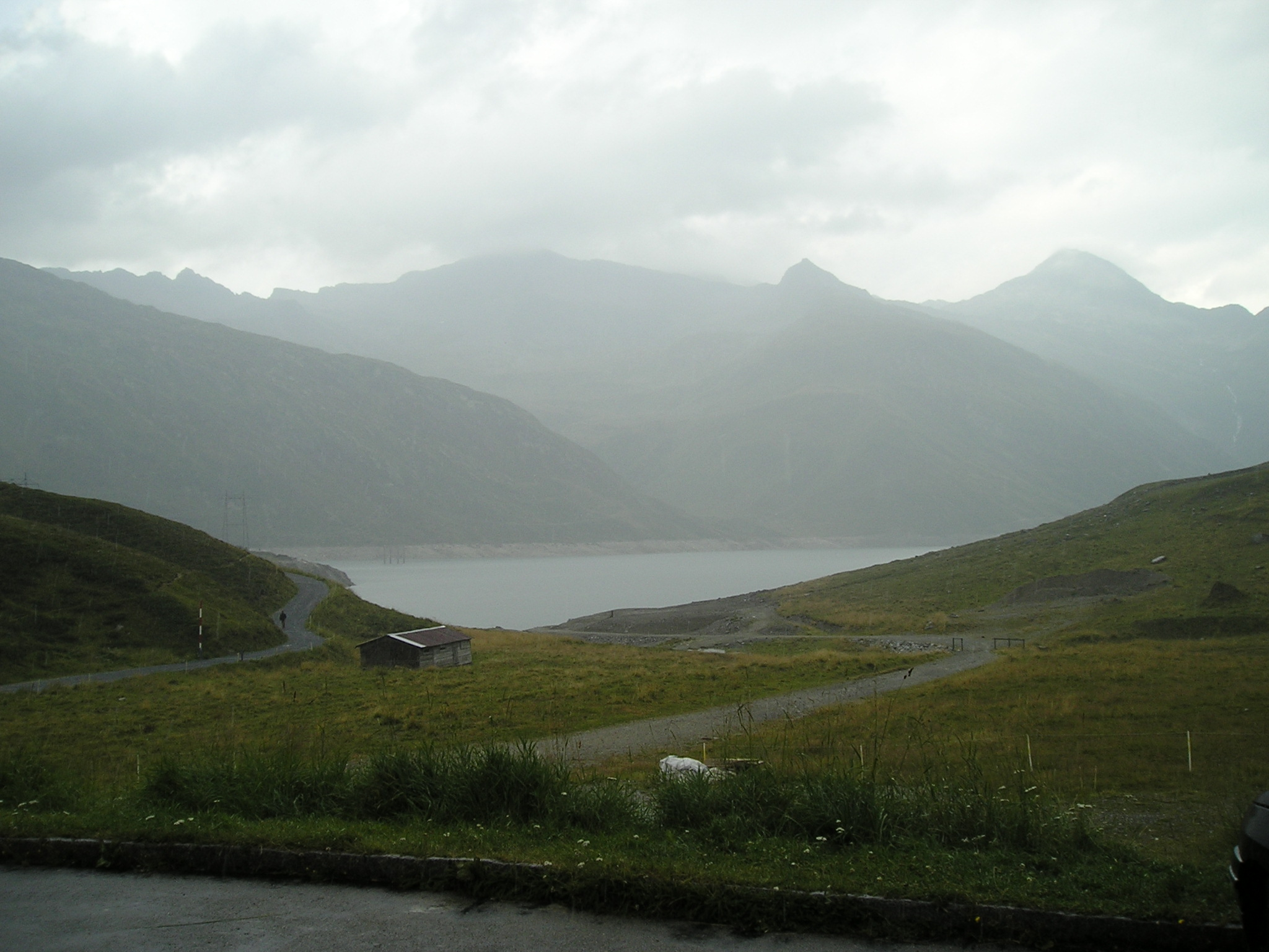 Foto del Passo del Lucomagno (agosto 2003), autore Massimo Macconi